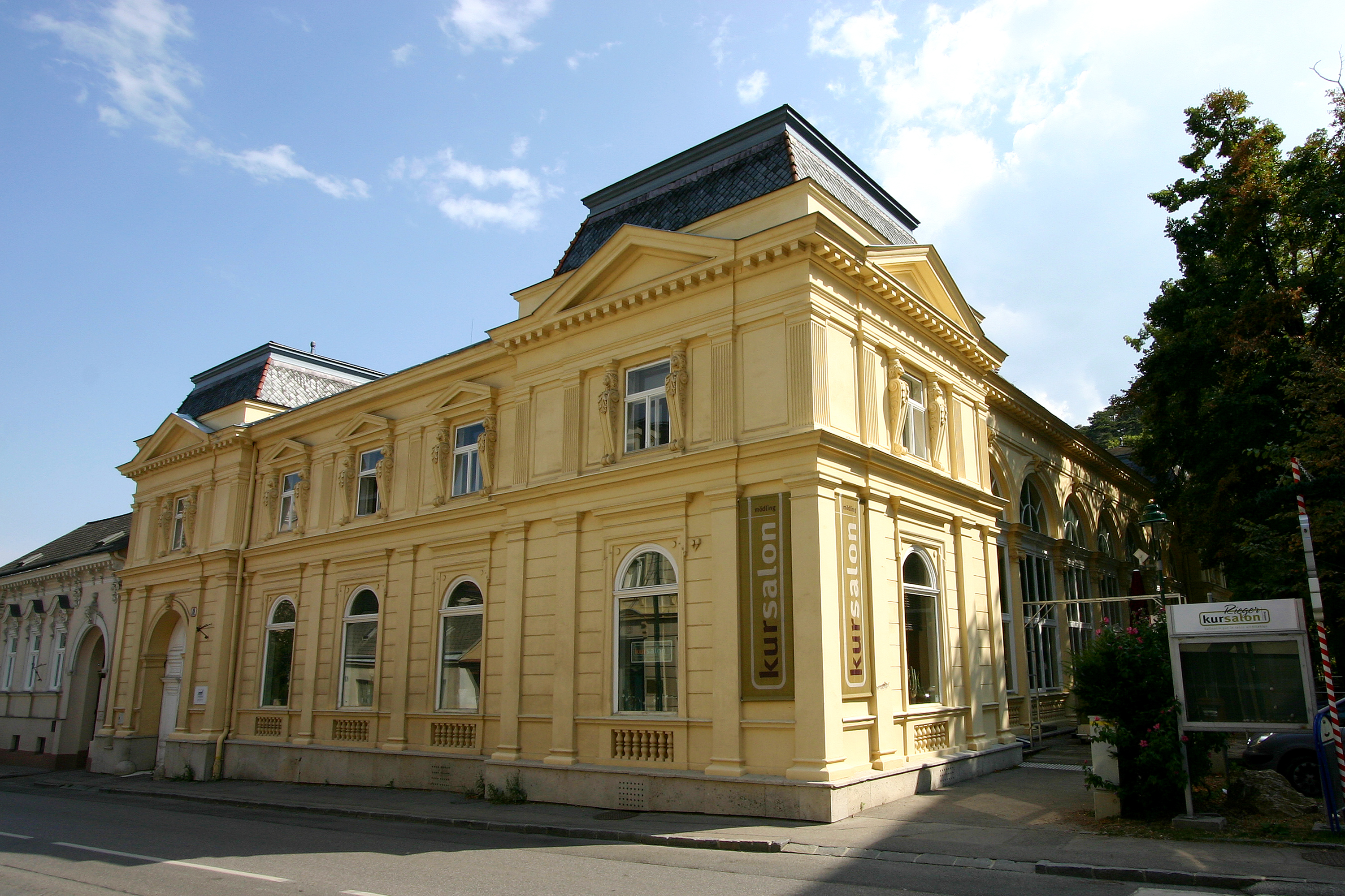 Kursalon in Mödling. Bis 1974 war hier ein Teil der Elektronikabteilung der HTL Mödling untergebracht. Heute beherbert das Gebäude ein Lokal.